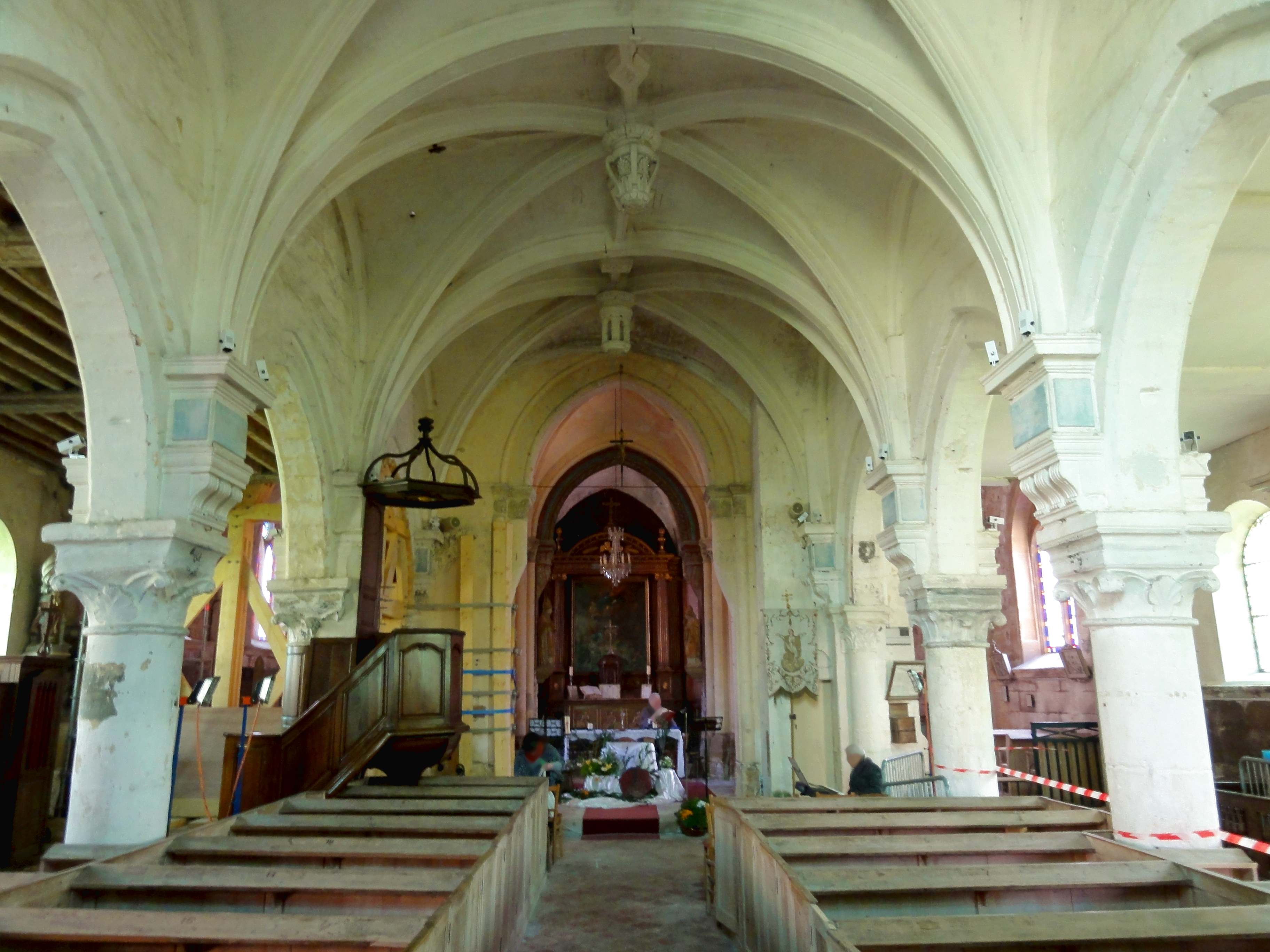 Intérieur de l'église (voir titre).